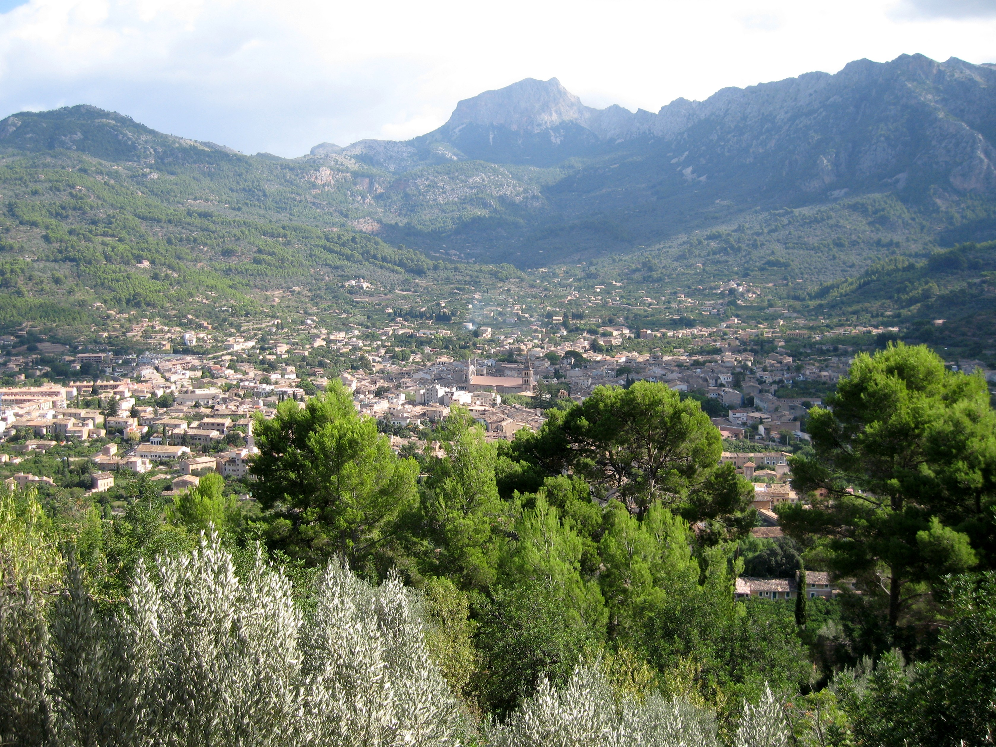 Sóller, Mallorca, Spanien